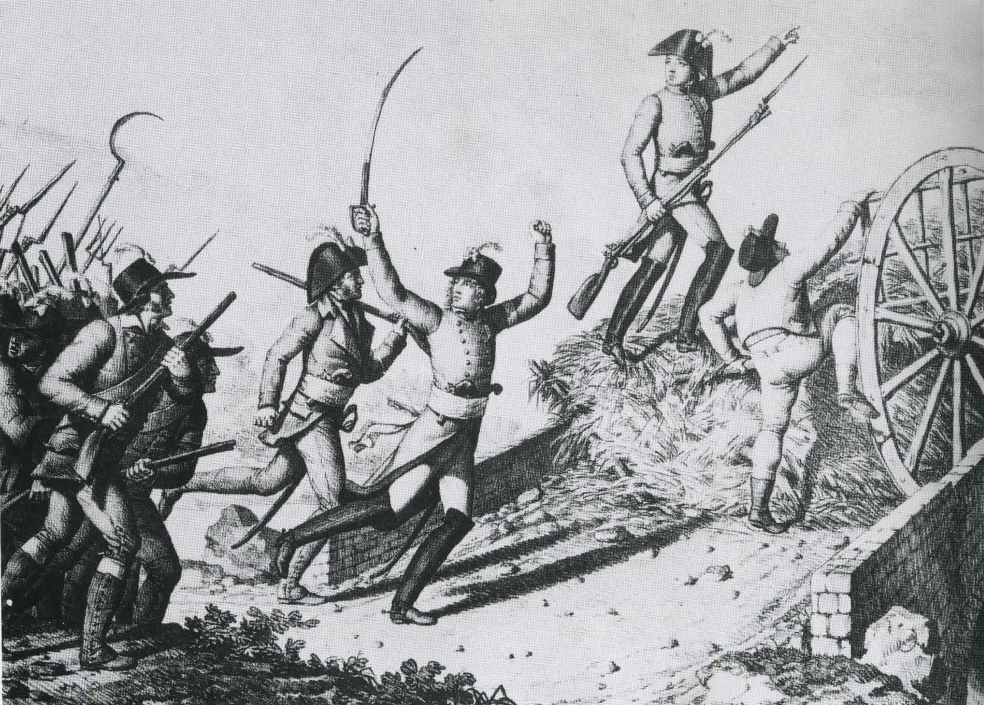 La Rochejacquelein et Lescure à la tête des Vendéens à la bataille de Thouars